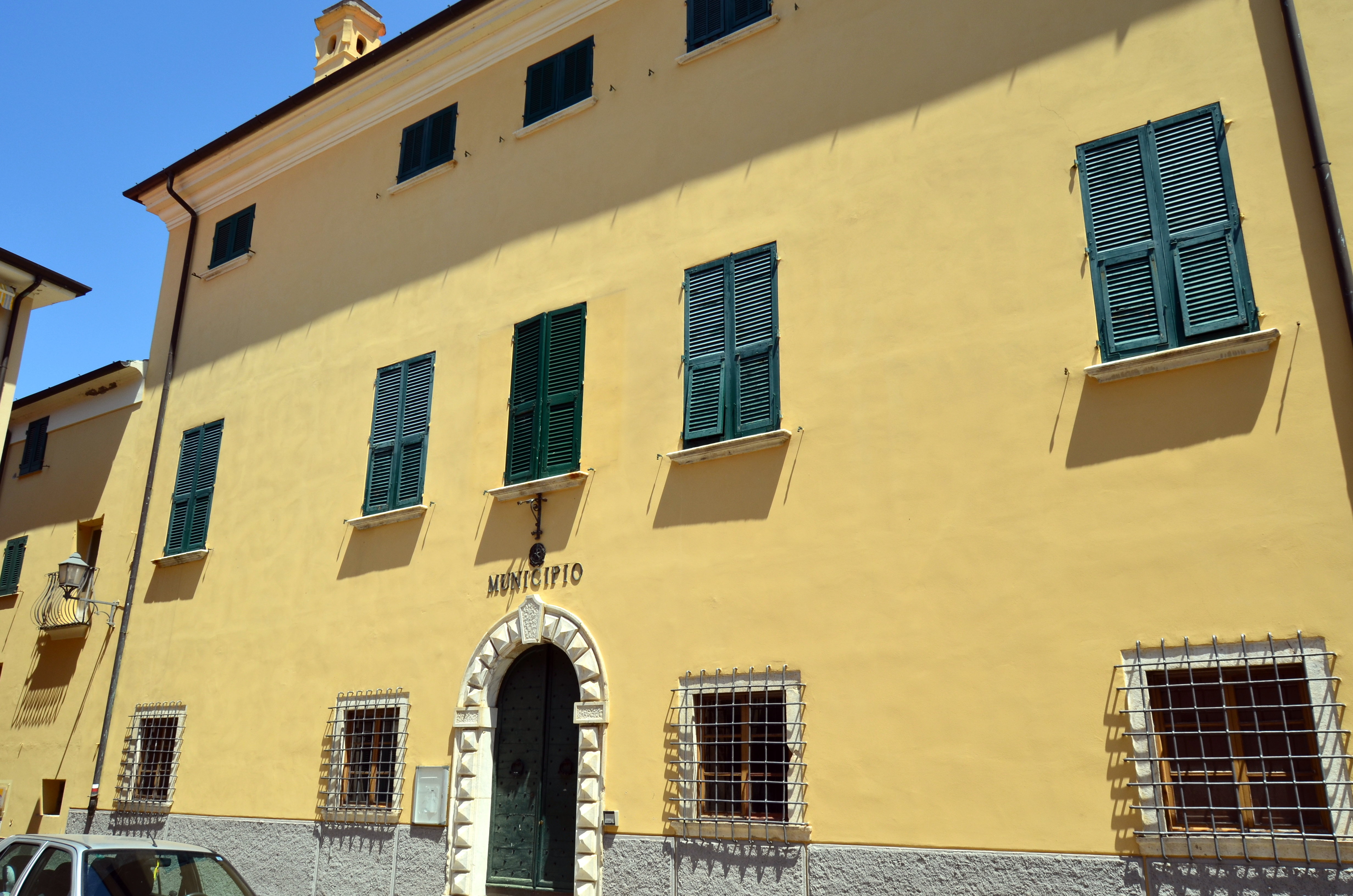 Il municipio di Castelnuovo Magra, Liguria, Italia